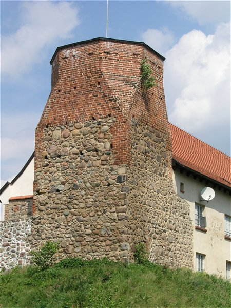 Burg Wesenberg(Mecklenburg)--Castle of Wesenberg(Germany/Mecklenburg)